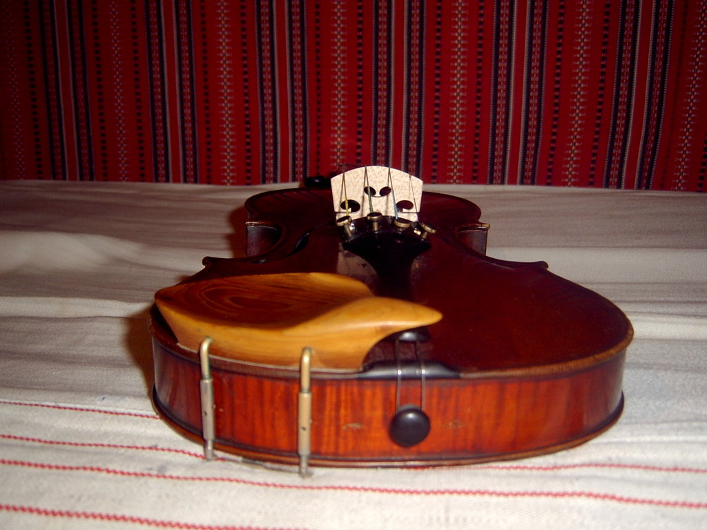 Hegedű alsó része - Violin